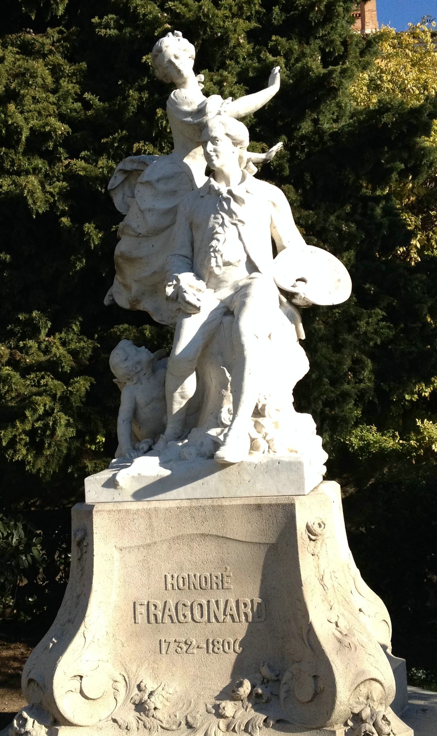 Statue de Fragonard à Grasse